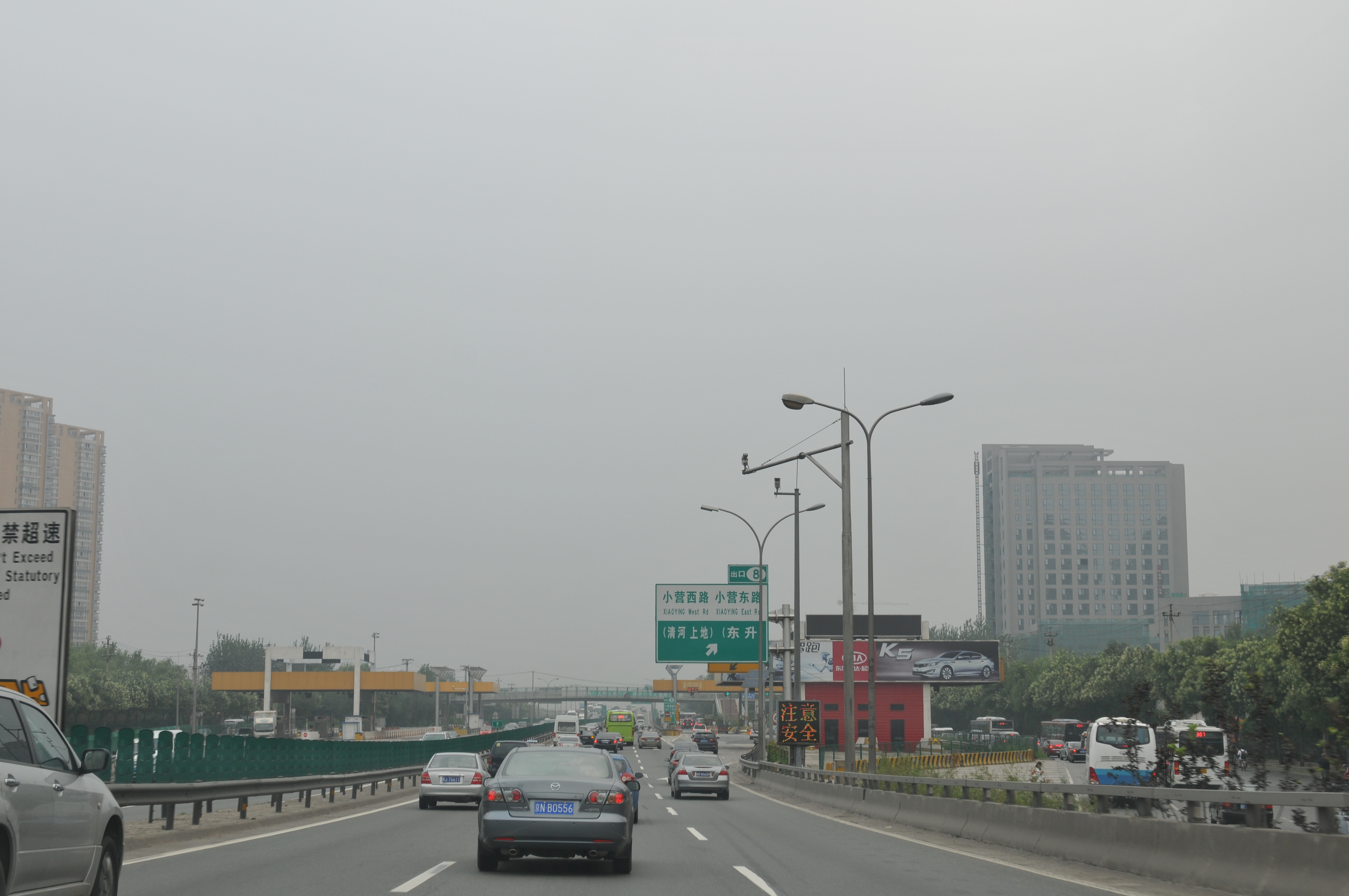 中国北京市海淀区 China Beijing,Haidian District, China Xinjiang Urumqi Welcome you to tour the, Китай Синьцзяна Урумчи приветствовать Вас на экскурсию, الصين ترحب زيارتك لاورومتشى فى شينجيانغ, 中国新疆のウルムチへの訪問を歓迎する, 中国新疆乌鲁木齐欢迎您来观光旅游